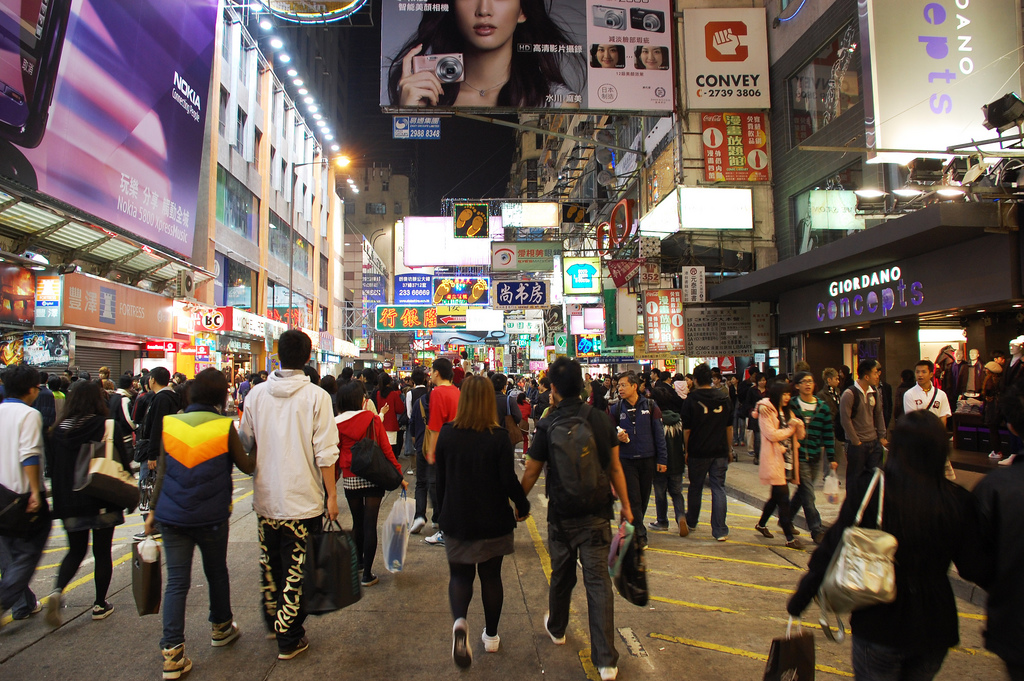 西洋菜南街夜景 Sai Yeung Choi Street South